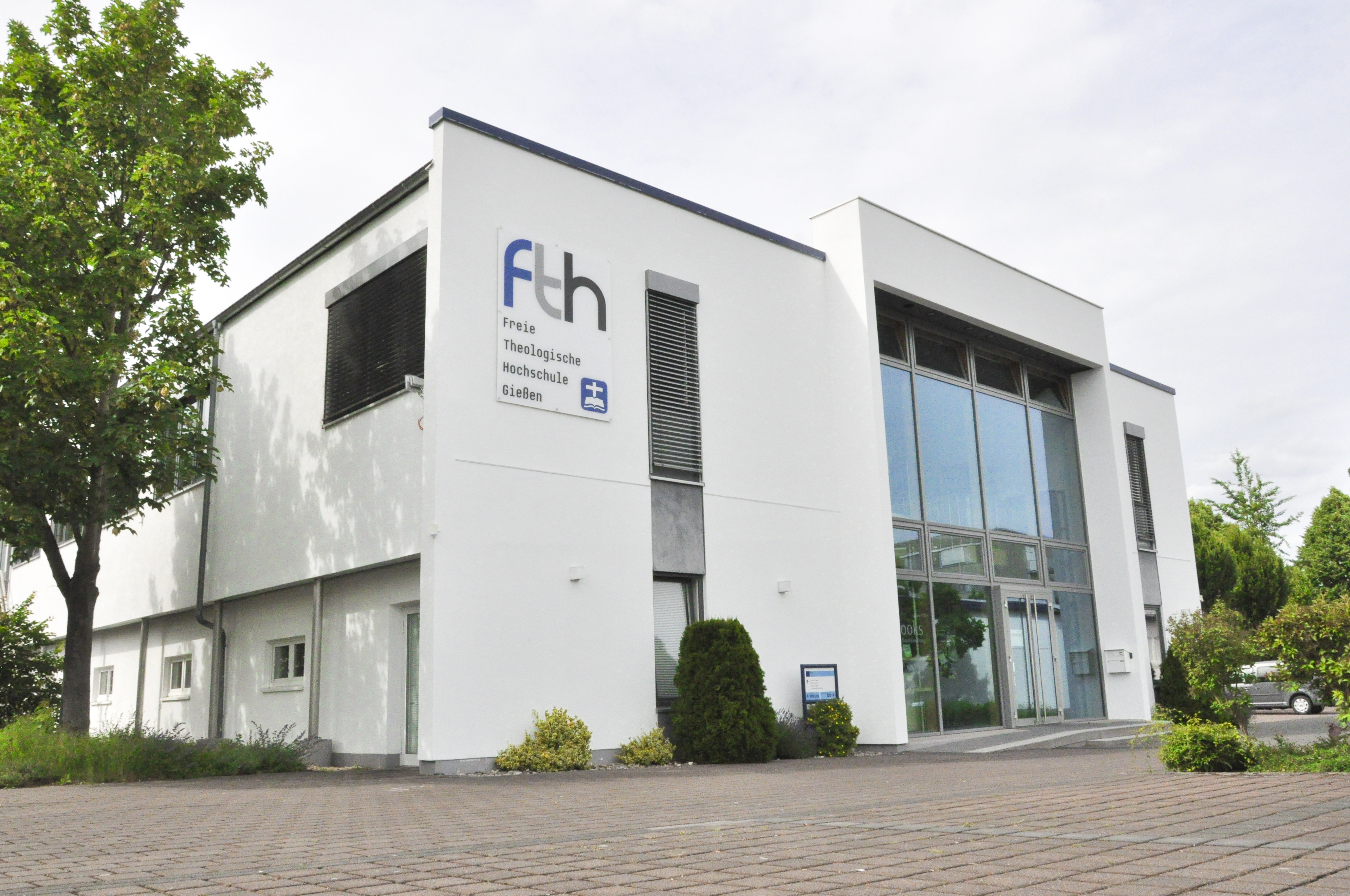 Freie Theologische Hochschule Gießen, Hessen, Deutschland